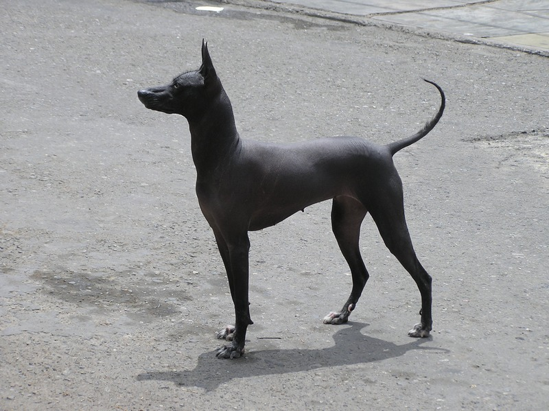 Lucrecia a perfect Peruvian Hairless Dog pedigree. Trujillo, Peru